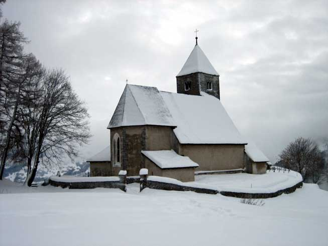 Kirche St. Remigius